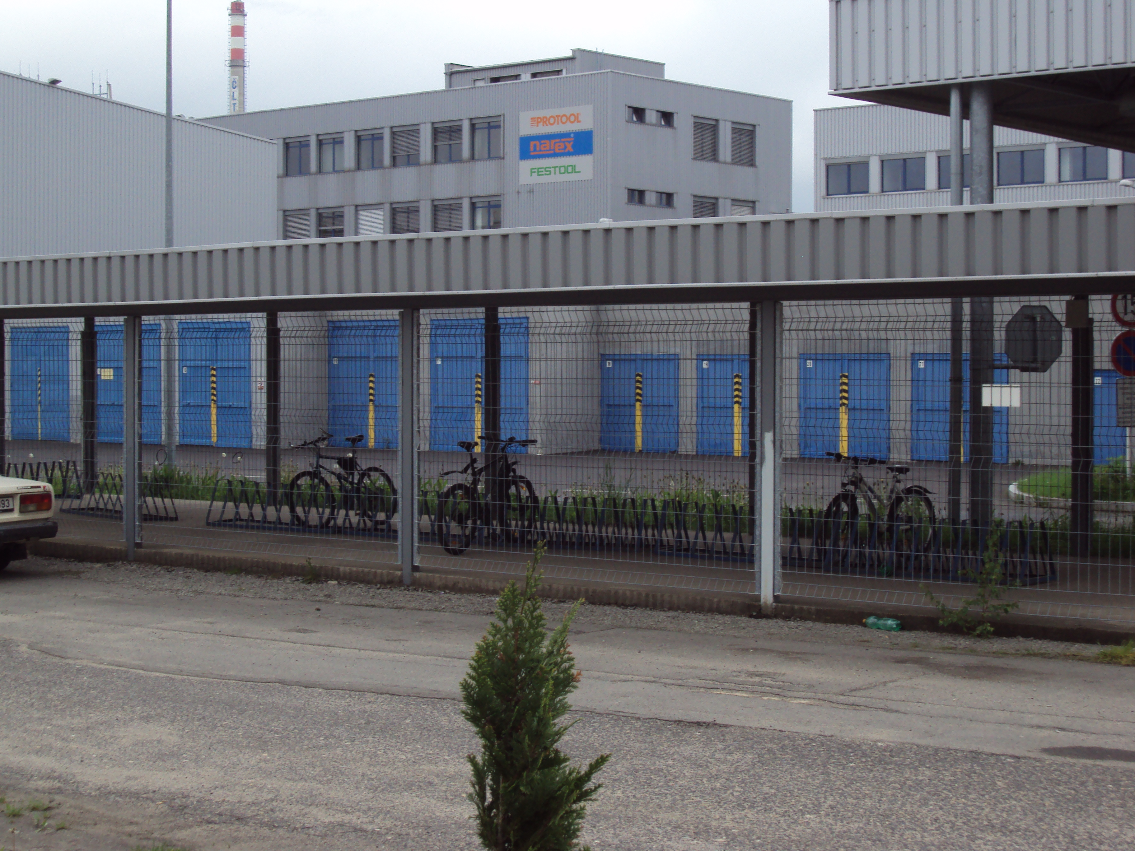 Část areálu výrobce el.nářadí v České Lípě